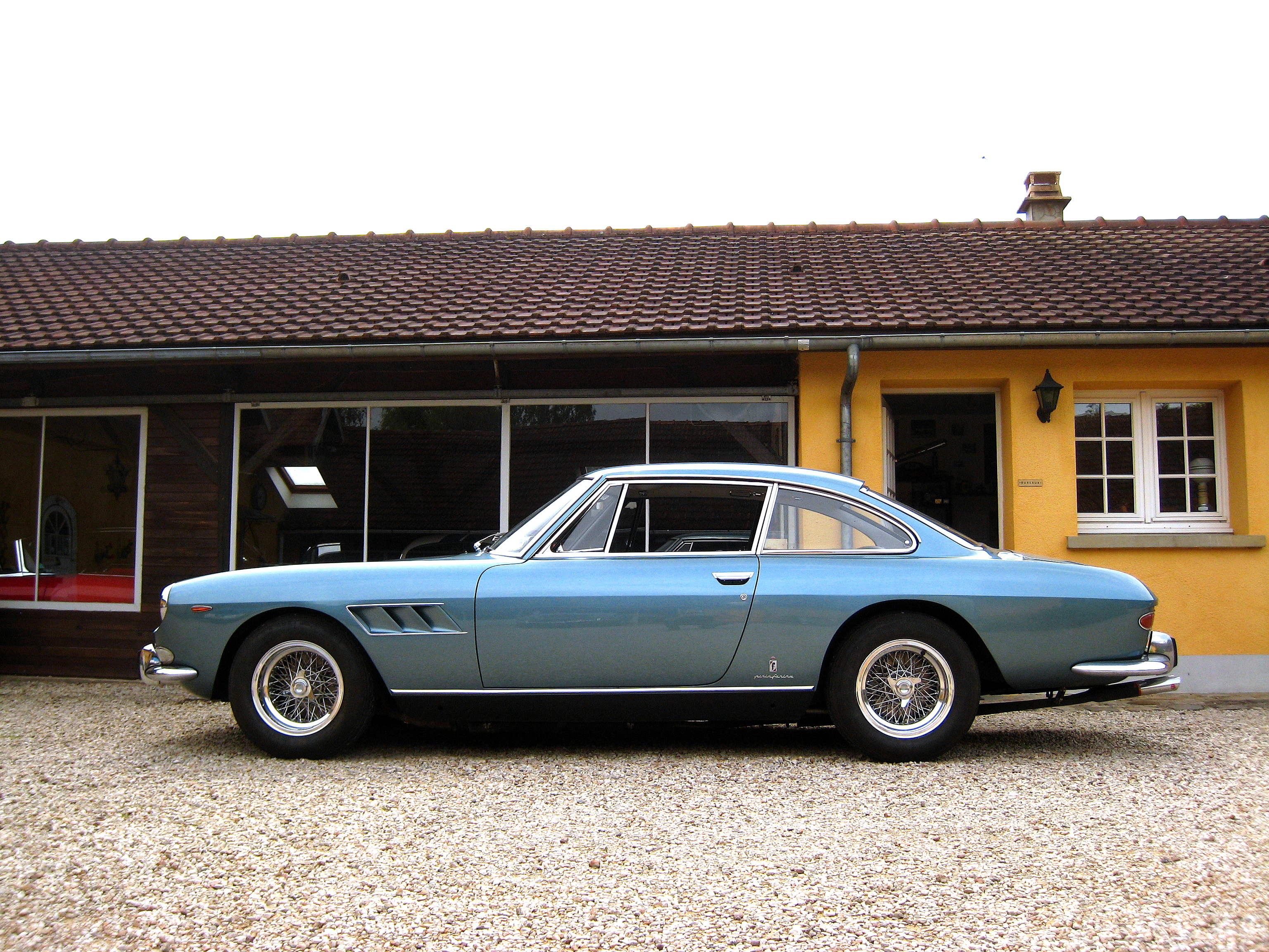 Photo de ma Ferrari 330GT de 1966